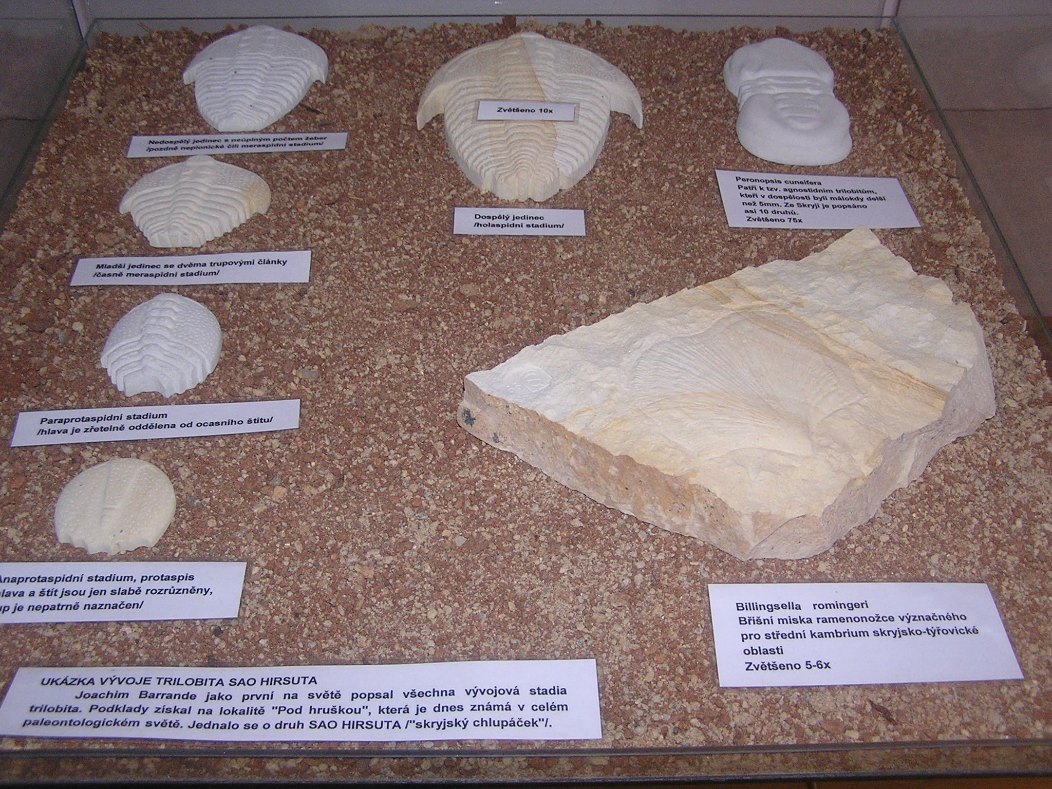 Expozice paleontologie - ukázka vývoje trilobita Sao hirsuta